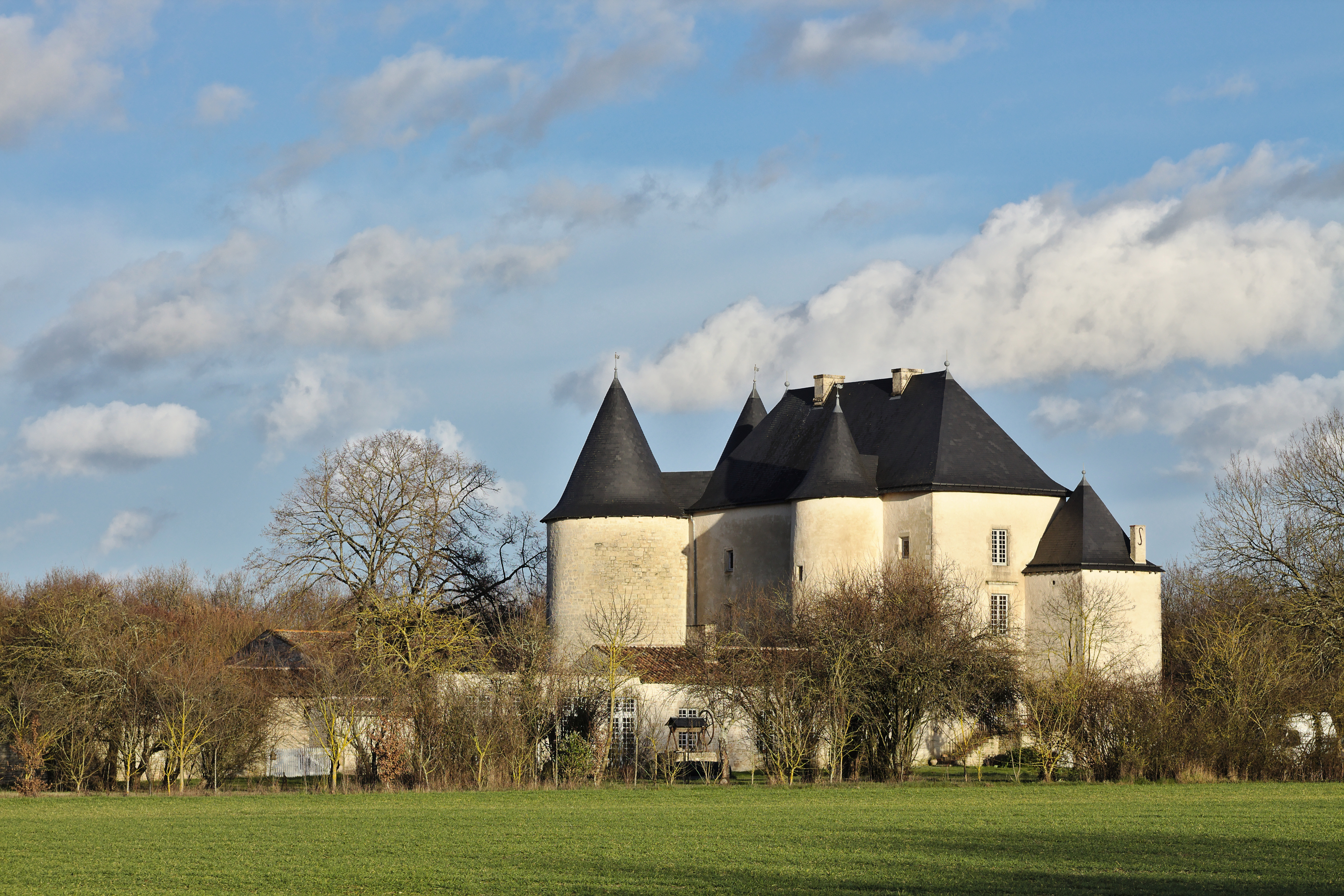 La Commanderie, ancienne commanderie de templiers, Ensigné, Deux-Sèvres, Poitou-Charentes, France